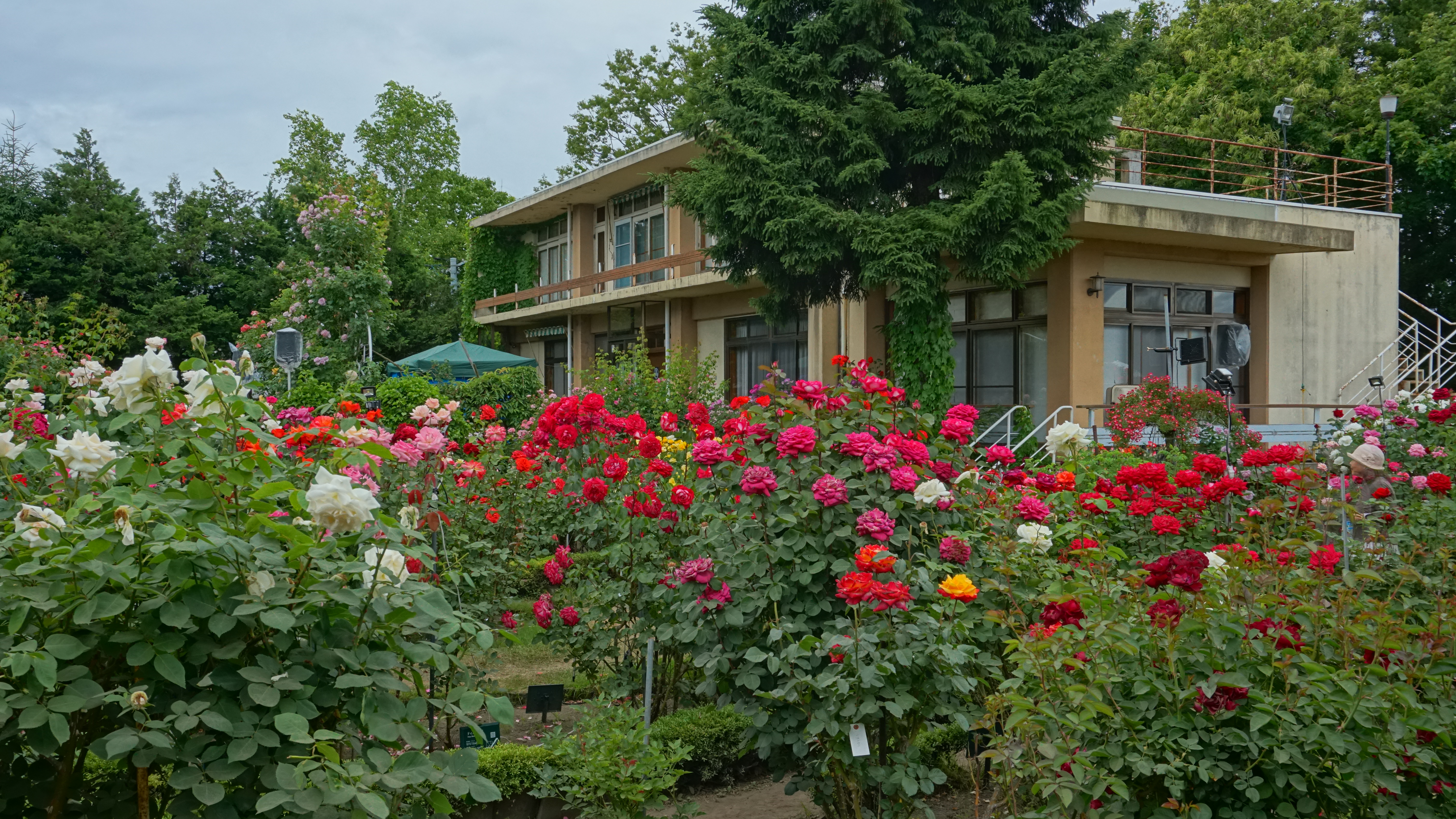 秋田県大館市にある石田ローズガーデン。元衆議院議員石田博英の私邸が大館市に寄贈され、バラ園が公開されている。